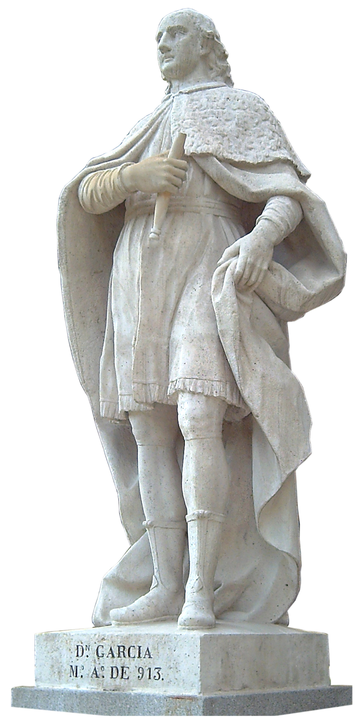 Estatua del rey García I, primer rey de León (910-914). También es conocido por el conde de Castilla Don García. Tiene su estatua en el Paseo de la Argentina del Parque del Retiro, Madrid.